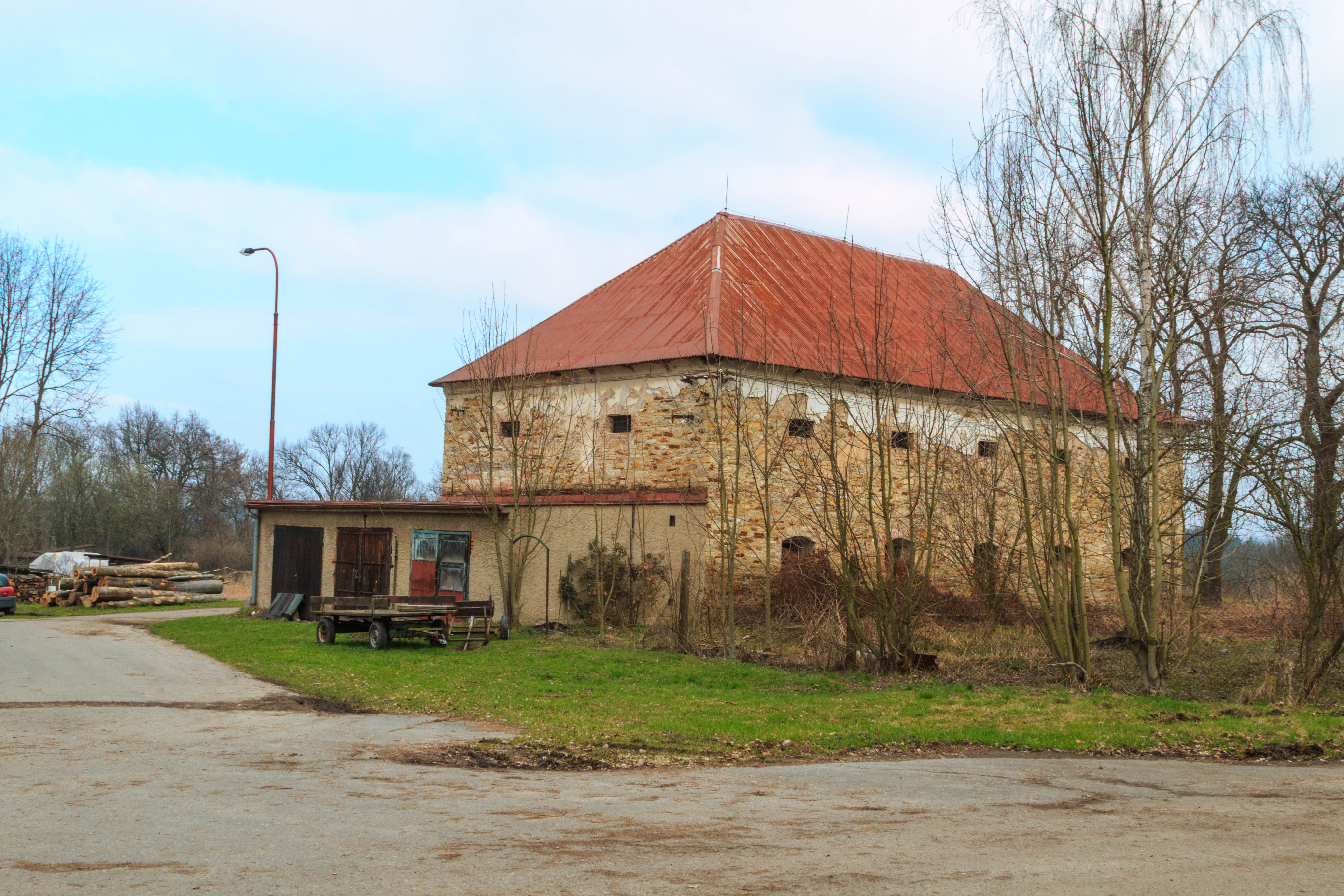 Kostelecká Lhotka - bývalý hospodářský dvůr